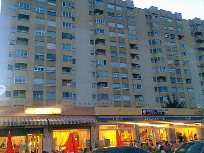 la casona de pinilla desde la calle Esla